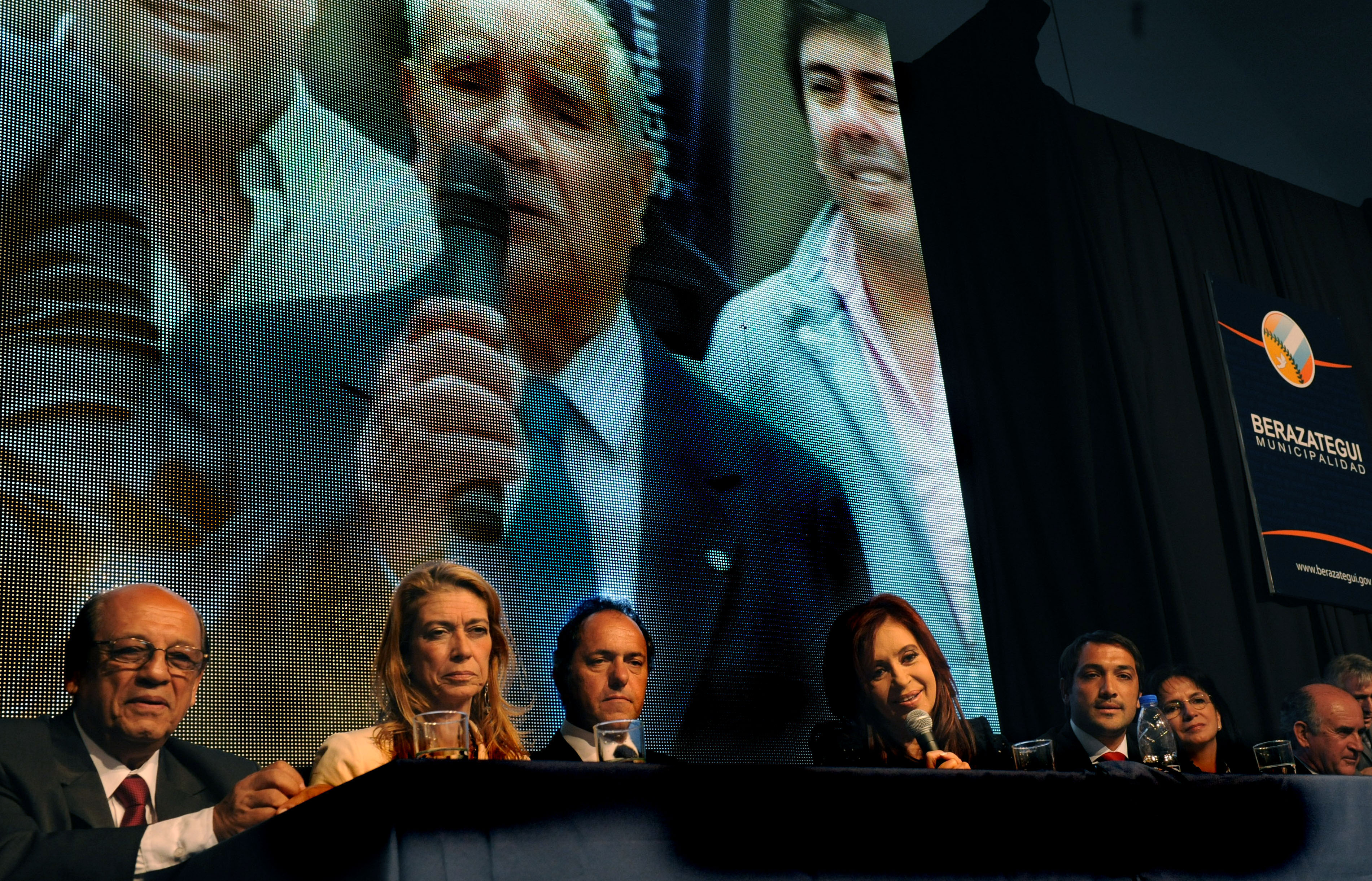 La presidenta Cristina Fernández dialoga mediante videoconferencia con un vecino de la localidad de Plátanos. La acompañan el secretario de Medio Ambiente, Juan José Mussi, la ministra de Industria, Debora Giorgi, el gobernador bonaerense, Daniel Scioli, el intendente de Berazategui, Juan Patricio Mussi, y el secretario general de la Presidencia, Oscar Parrilli.